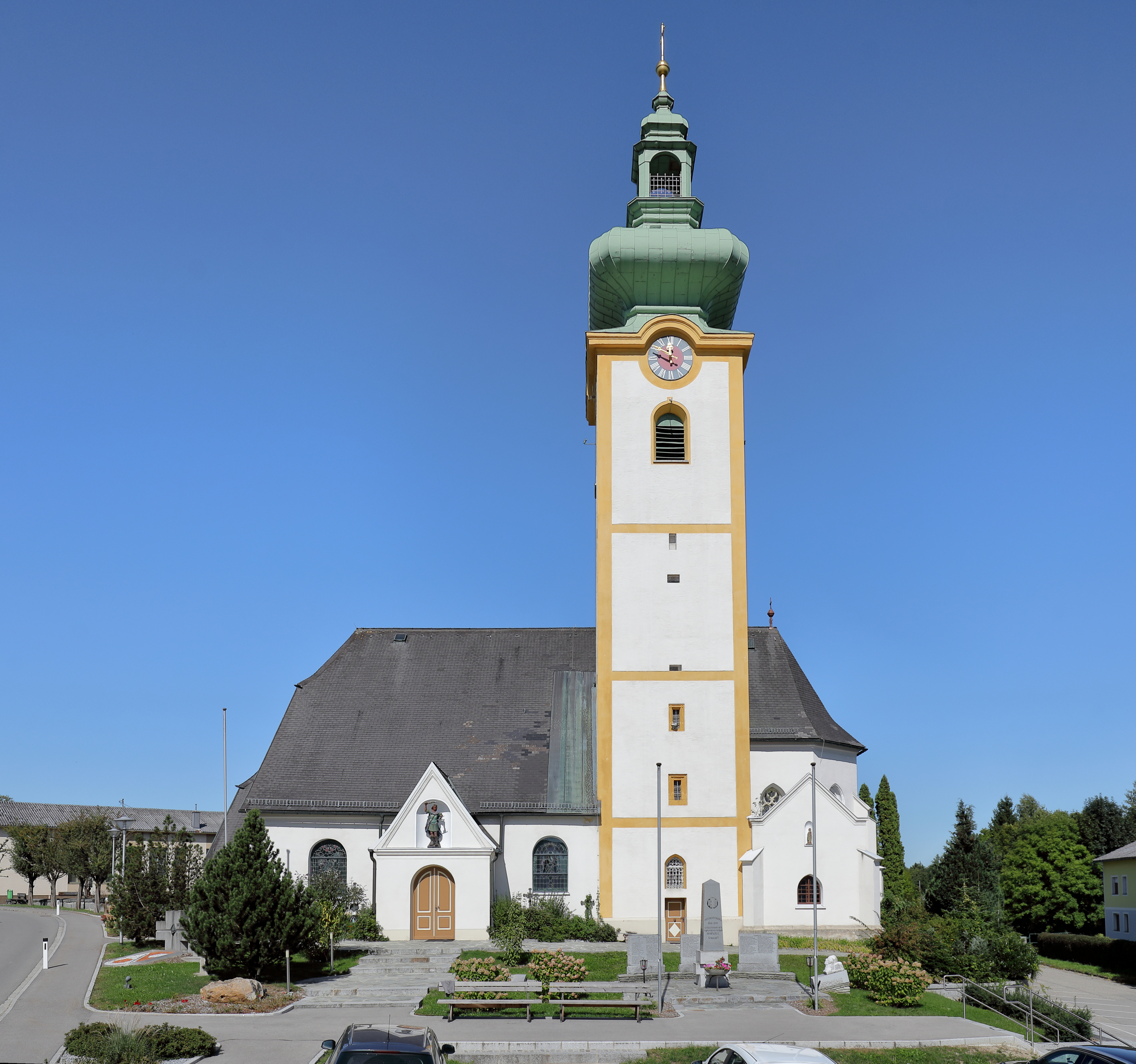 Südsüdostansicht der röm.-kath. Pfarrkirche hl. Michael in der oberösterreichischen Gemeinde Hohenzell.Ursprünglich eine gotische Kirche mit Dachreiter. Der Glockenturm im südlichen Chorwinkel wurde zur Barockzeit errichtet und 1685 wurde eine Seitenkapelle mit einer kleinen Eingangshalle angebaut.